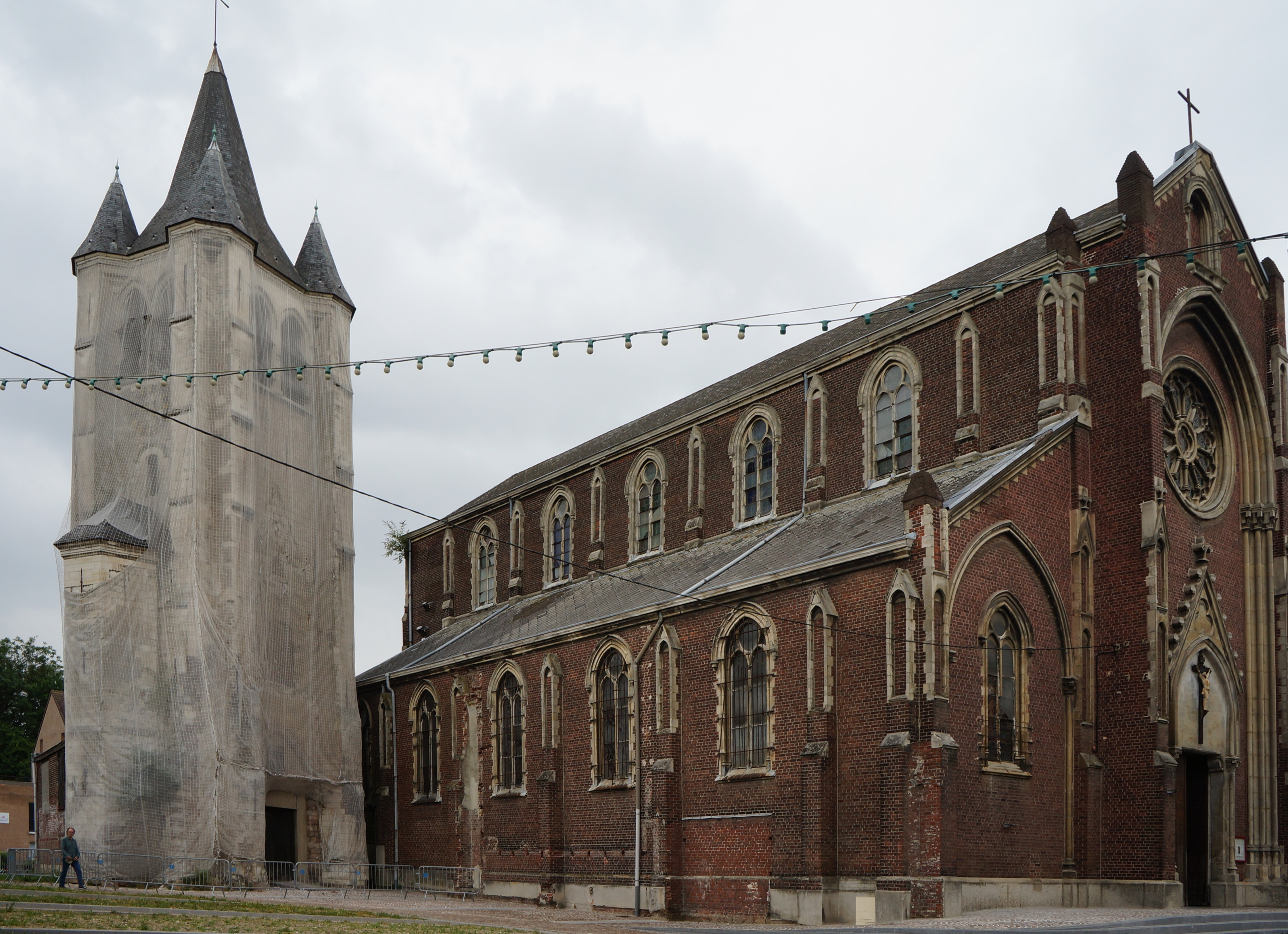 L'église Saint-Denis d'Hellemmes Lille Nord (département français)